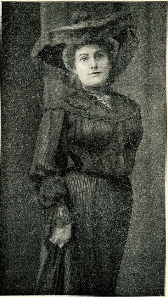 Српска књижевница Милена Миладиновић (1868-1928). Слика из 1904. године. Из књиге "Божићне приче", Нови Сад 1904, стр. 2.